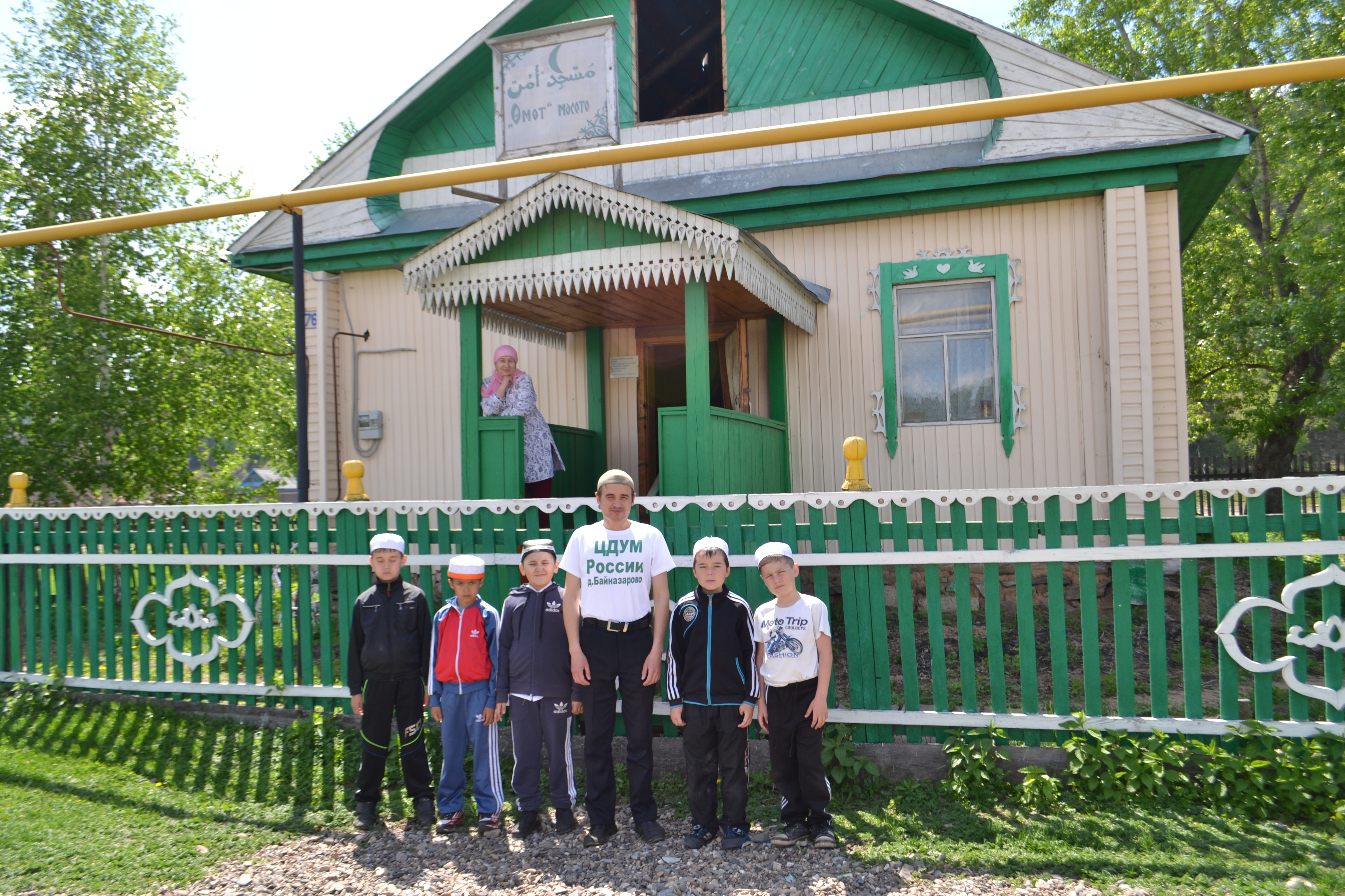 Башҡортса: Башҡортостан Республикаһы Бөрйән районы Байназар ауылындағы "Өмөт" мәсете.